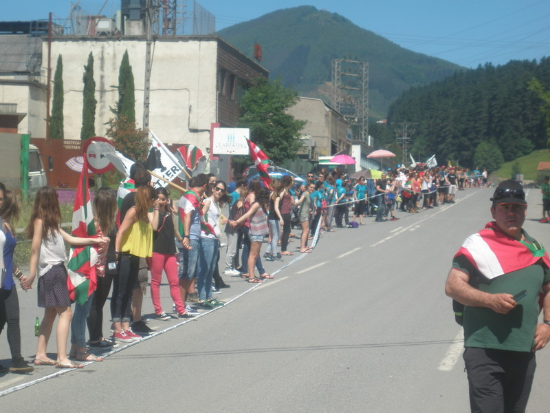 2014an Gure Esku Dagok Durango eta Iruñearen artean antolatutako Giza Katea, Itsason